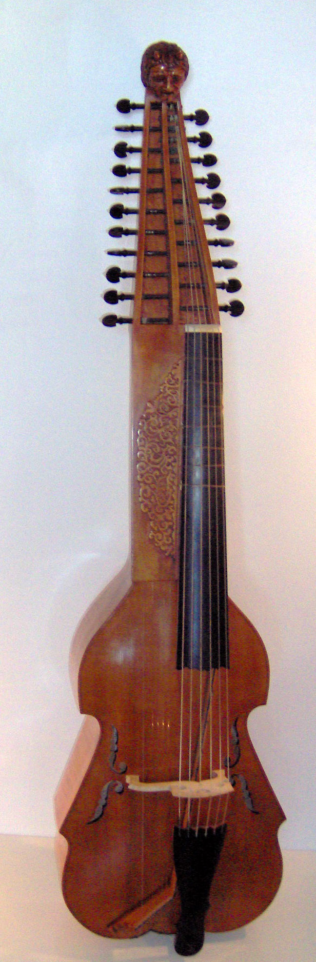 Musical instrument